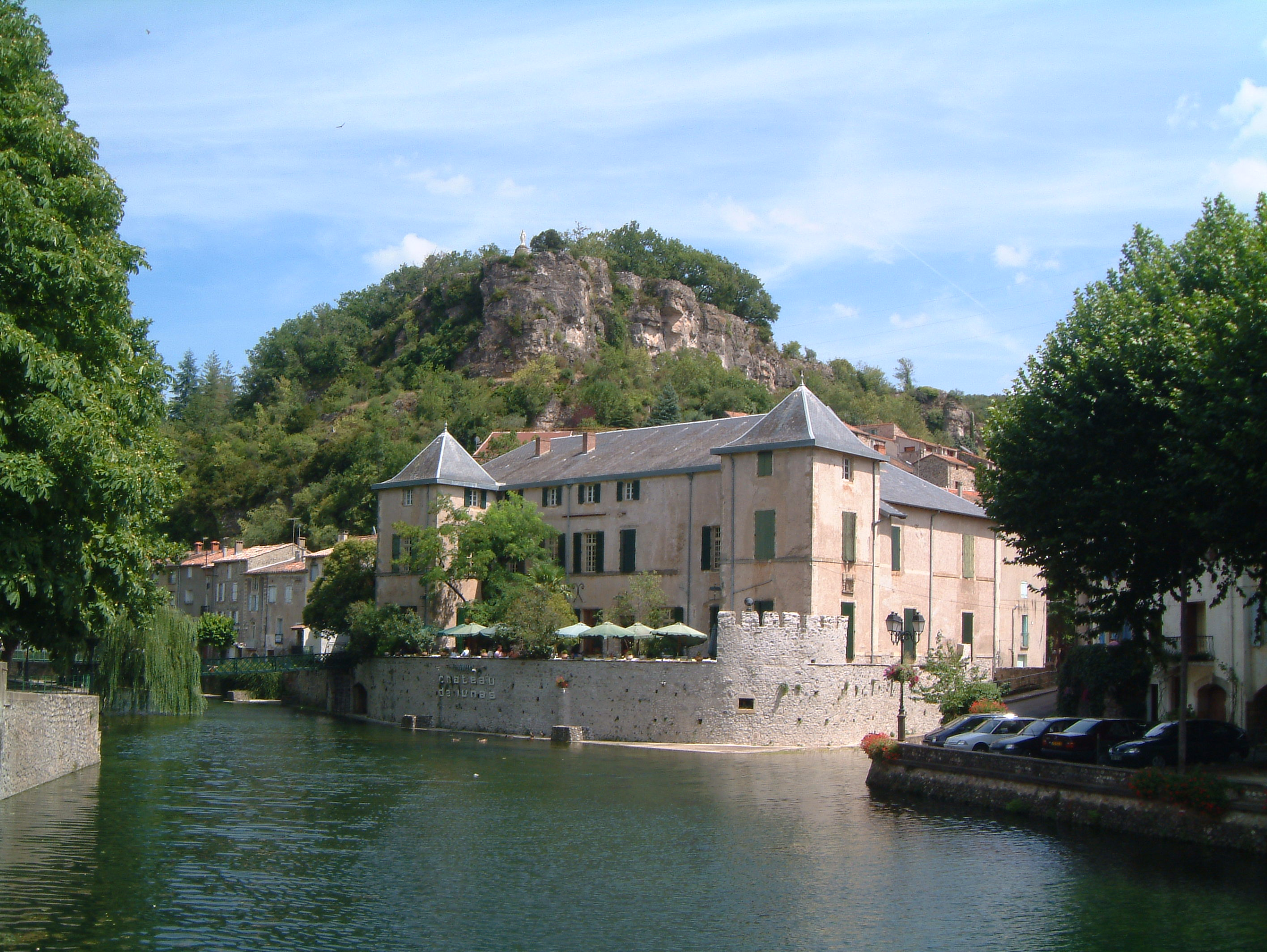 Château de Lunas (Restaurant) in Lunas, Hérault, France- Rivières de Gravezon (à gauche) et de Nize (à droite).